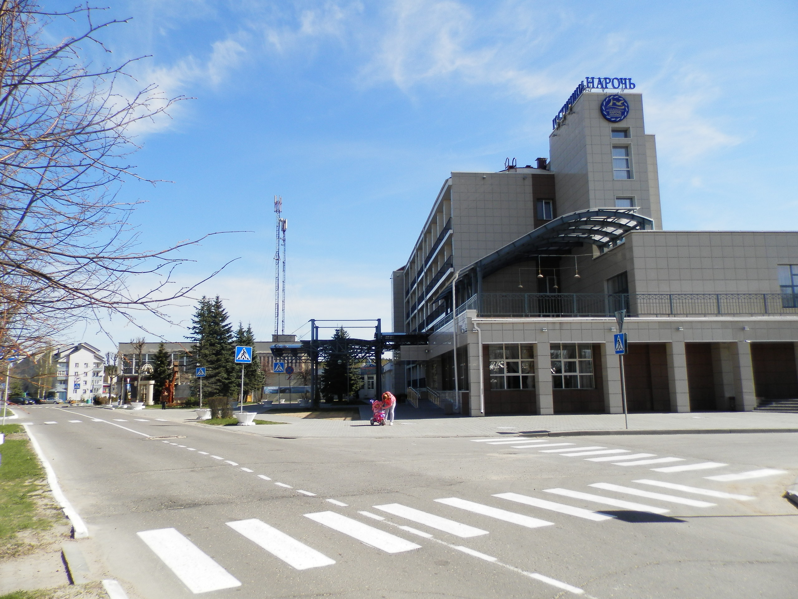 Центр курортного поселка Нарочь